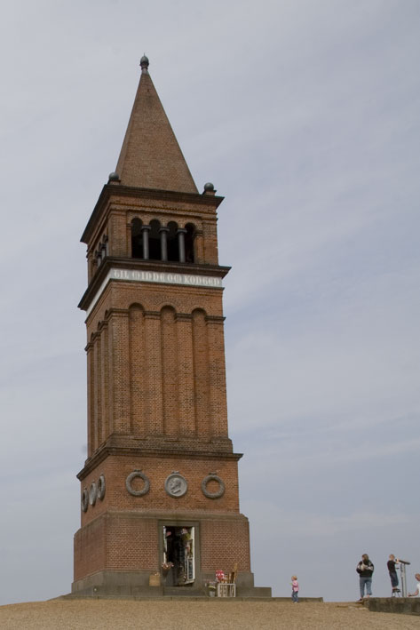 Himmelsbjergtornet